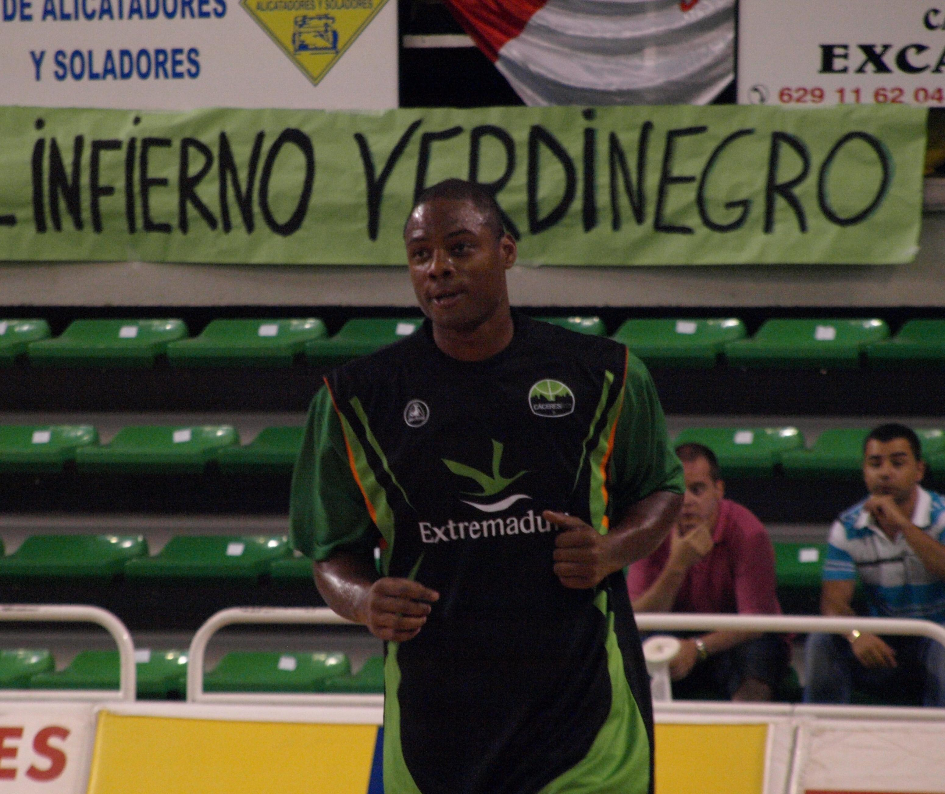 Adrian Moss, con la camiseta del Cáceres 2016 en el primer partido de la temporada 2008-09 disputado en el Pabellón Multiusos de Cáceres ante el Autocid Burgos